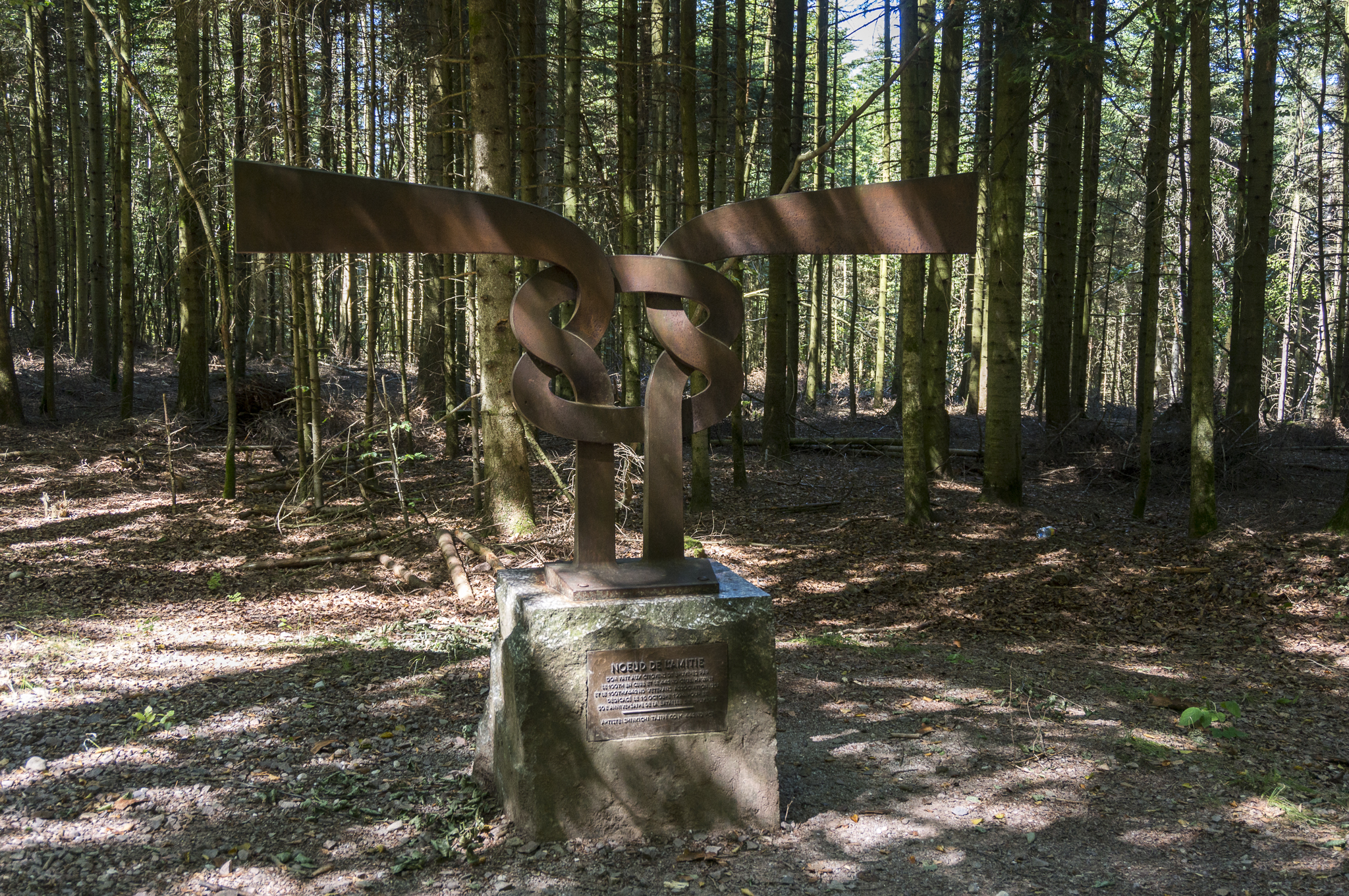 Bruyères dans les Vosges : le Nœud de l'Amitié, créé par le Professeur Shinkichi TAJIRI est un don aux Bruyèrois en mémoire de leur reconnaissance aux soldats du 100/442ème RCT libérateur de Bruyères. Ce monument est situé dans la forêt communale de Bruyères, à proximité du Monument Américain.